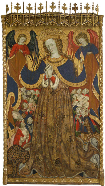 Tabla gótica procedente de la ermita de la Virgen de la Carrasca , en Blancas (Teruel) actualmente se conserva en el Museo Nacional de Arte de Cataluña. Barcelona (Spain)